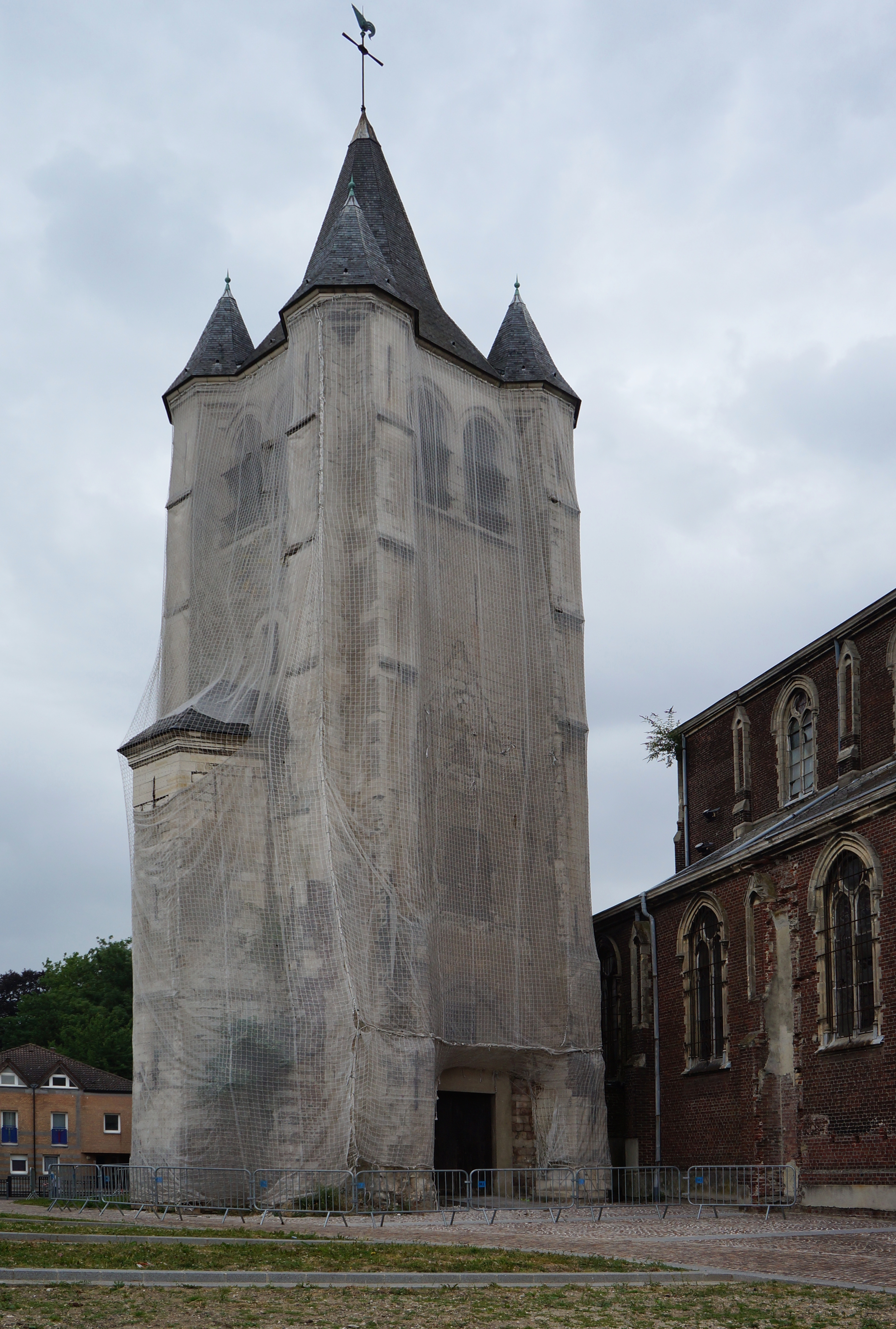 L'église Saint-Denis d'Hellemmes Lille Nord (département français)